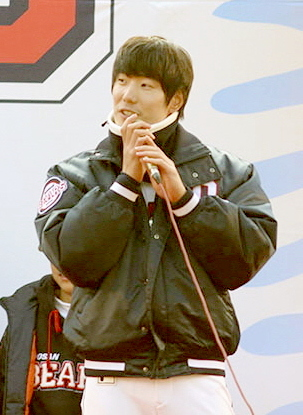 121202 두산베어스 곰들의 모임 시상 (김재호)